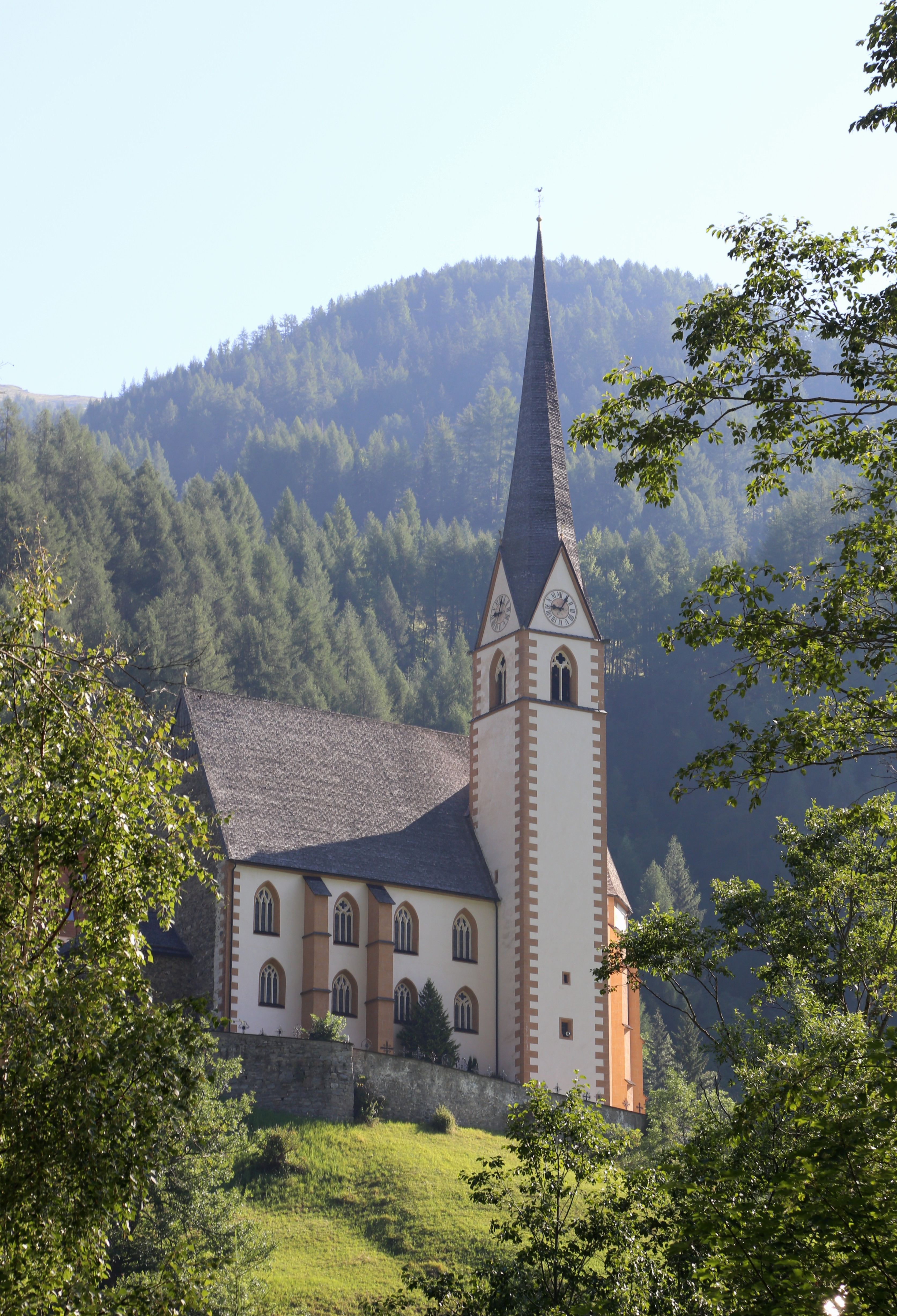 Pfarrkirche Hl. Vinzenz, Heiligenblut am Großglockner